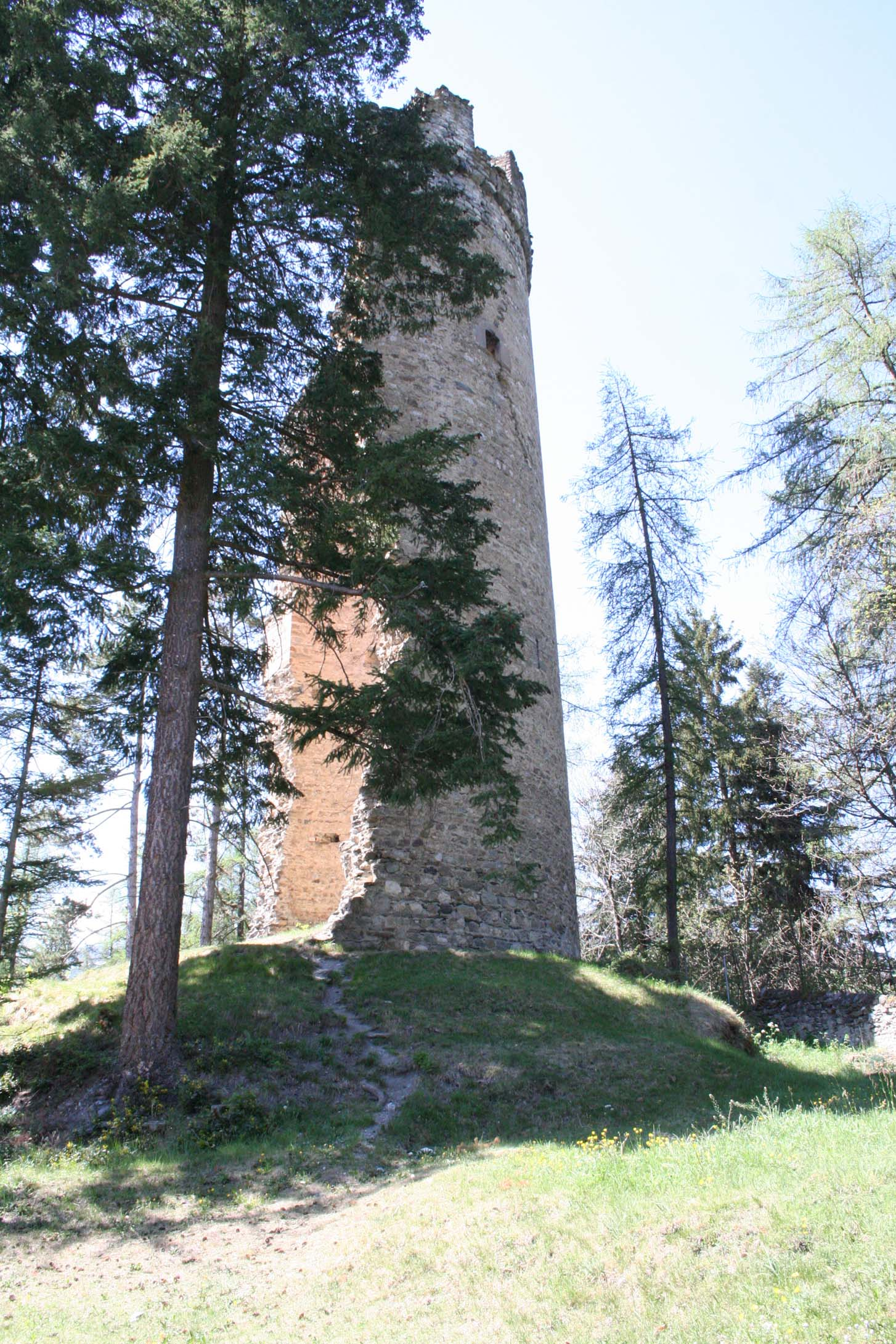 Turm